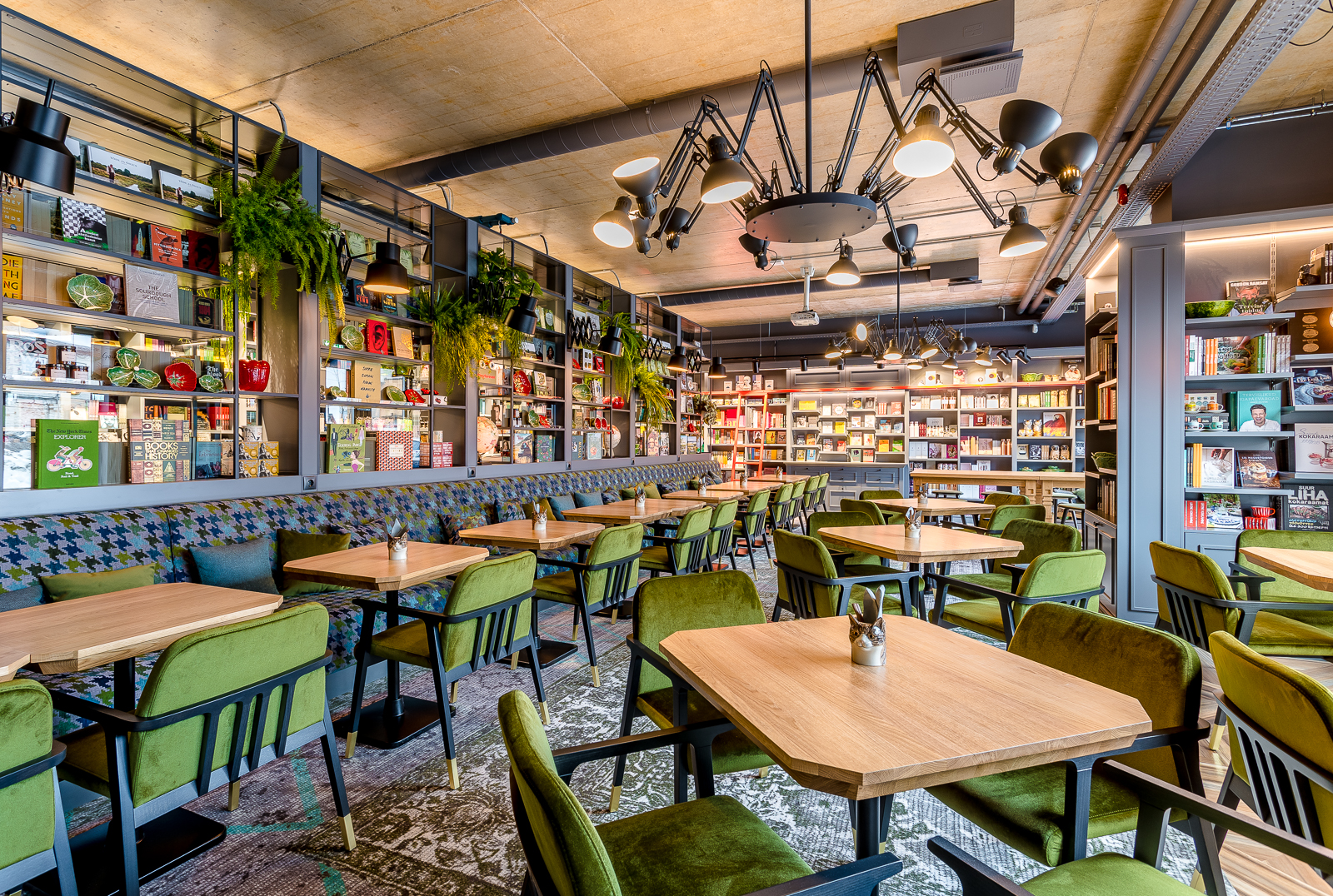 Telliskivi Rahva Raamatus saavad kokku head raamatud, suurepärane toit ja mõnus atmosfäär.